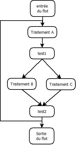 Graphe de flot simple